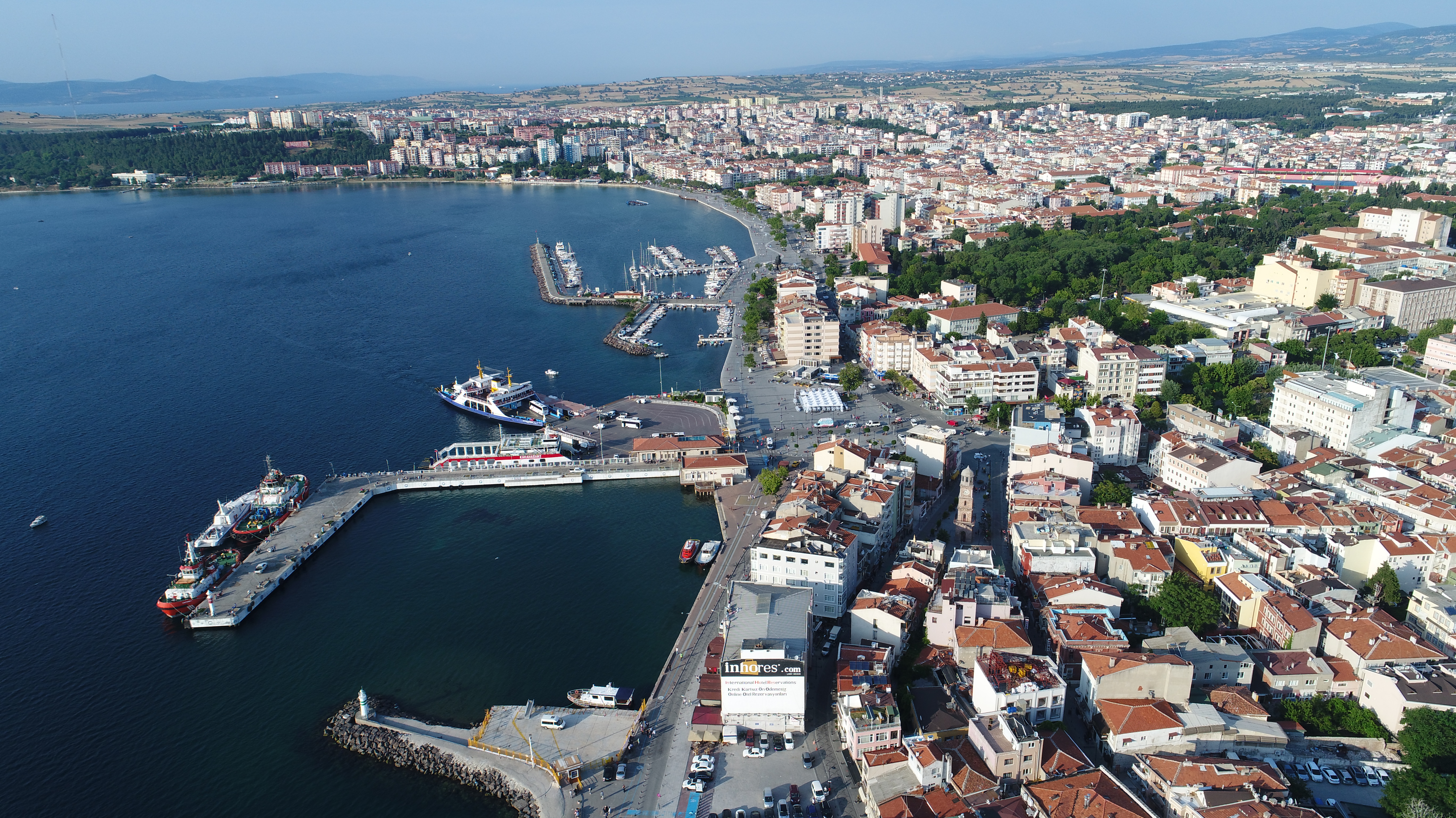 Çanakkale İskelesi Havadan Görüntüsü